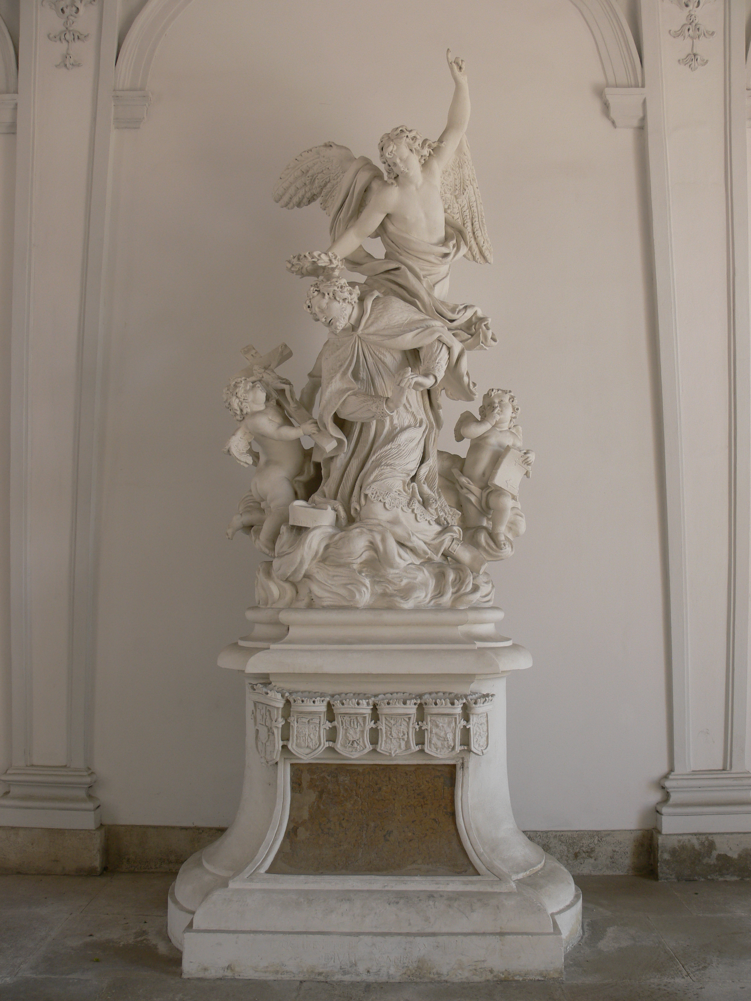 Wien, Unteres Belvedere, Skulptur im Durchgang zum Garten Sammlung: Österreichische Galerie Belvedere Johann Jakob Schoy: Apotheose des hl. Johannes von Nepomuk, 1724, Kalksandstein, Höhe 262 cm, Sockel 155 cm